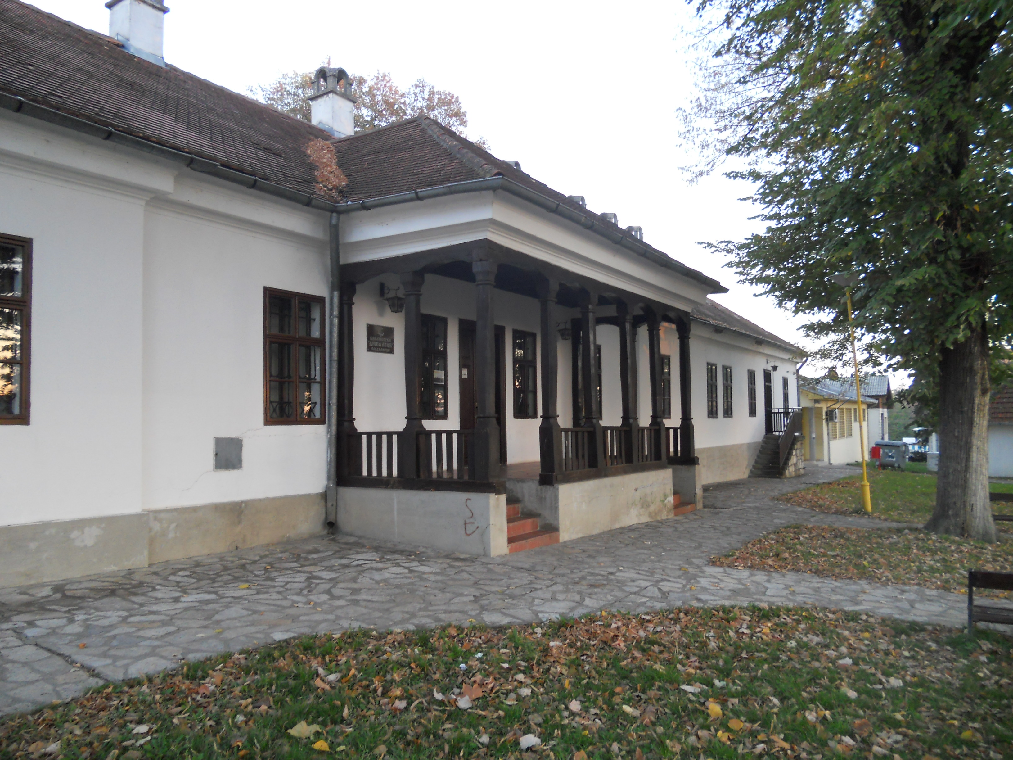 Konak u Vladimircima